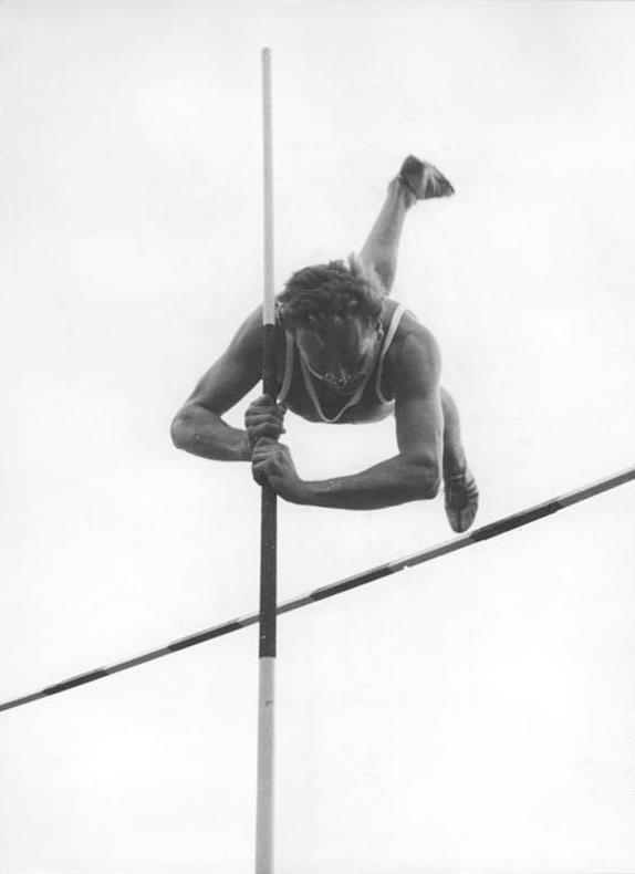 Randolph Peukert Zentralbild Funck Bey 28.7.1955 Abendsportfest der Leichtathleten. Am Mittwoch, dem 27. Juli 1955 fand im Berliner Walter-Ulbricht-Stadion ein Abendsportfest der Leichtathleten statt. An dieser Veranstaltung nahmen in erster Linie die Sportfreunde teil, die unsere Republik bei den V. Weltfestspielen der Jugend in Warschau vertreten werden. UBz: Der Stabhochspringer Randolph Peukert, der eine Höhe von 4,10 m bewältigte.